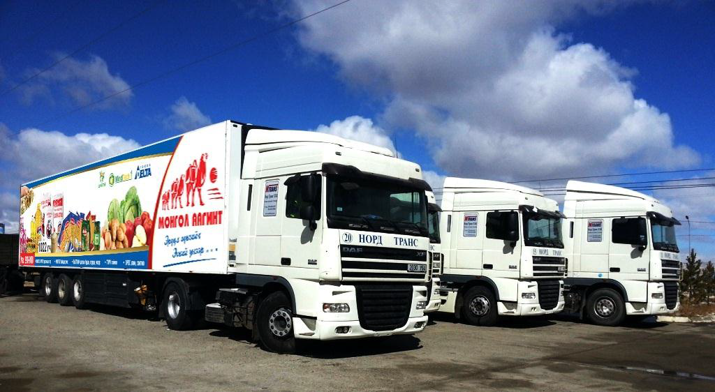 Монгол: Trucks